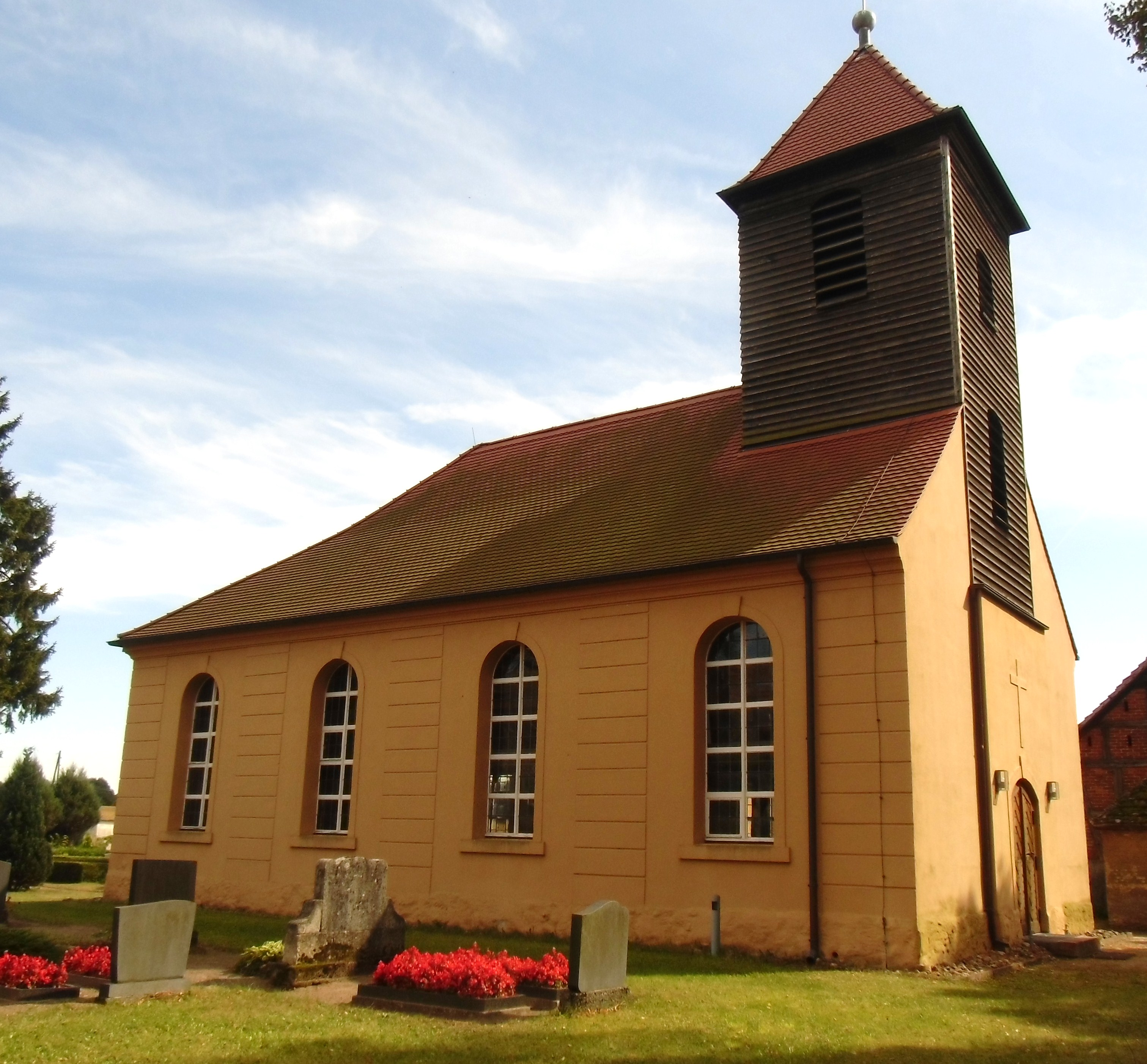 Denkmalgeschützte Dorfkirche im OT Elsholz von Beelitz